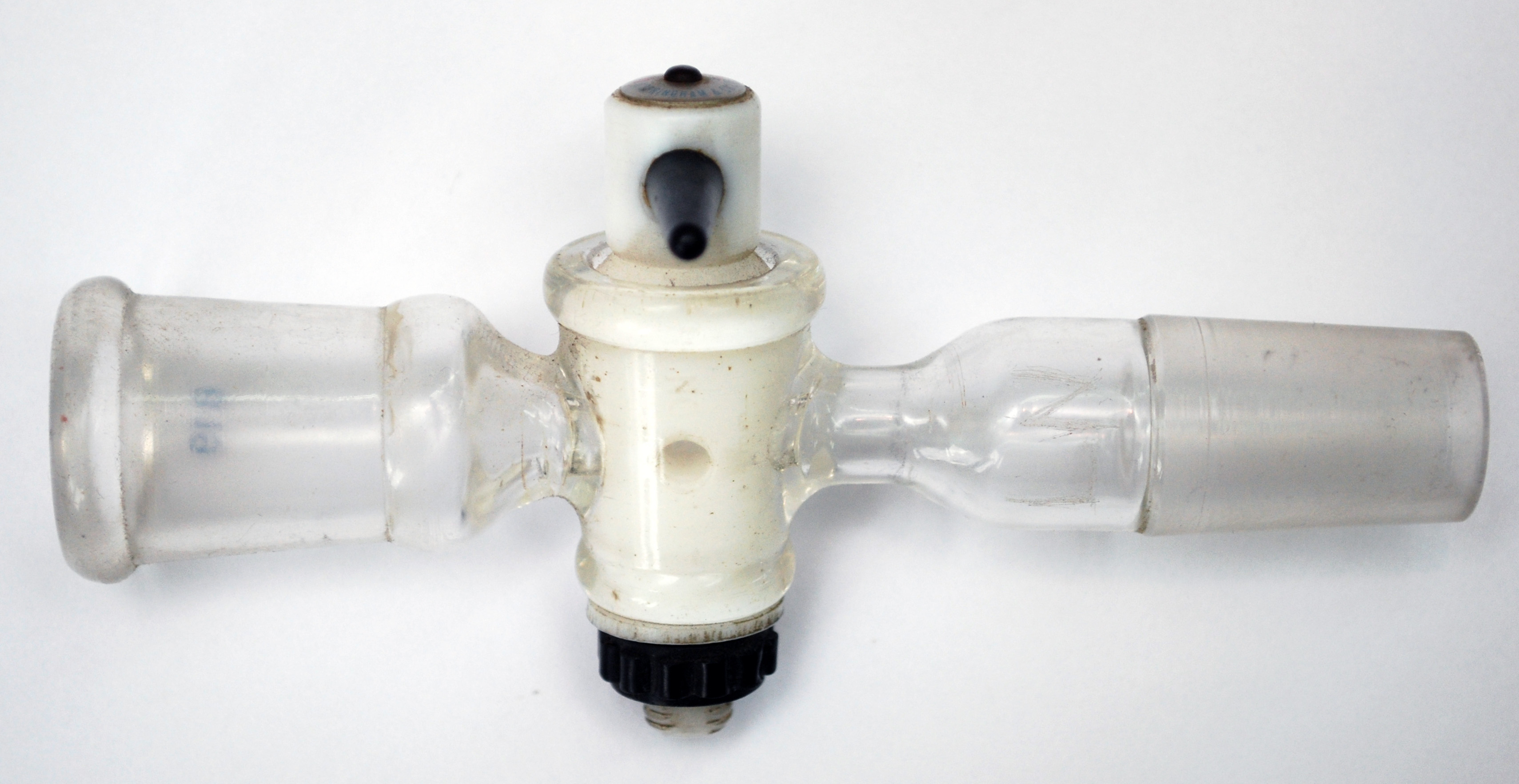 Simple vacuum teflon tap